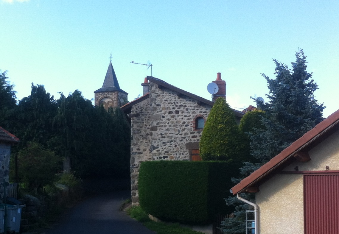 photo